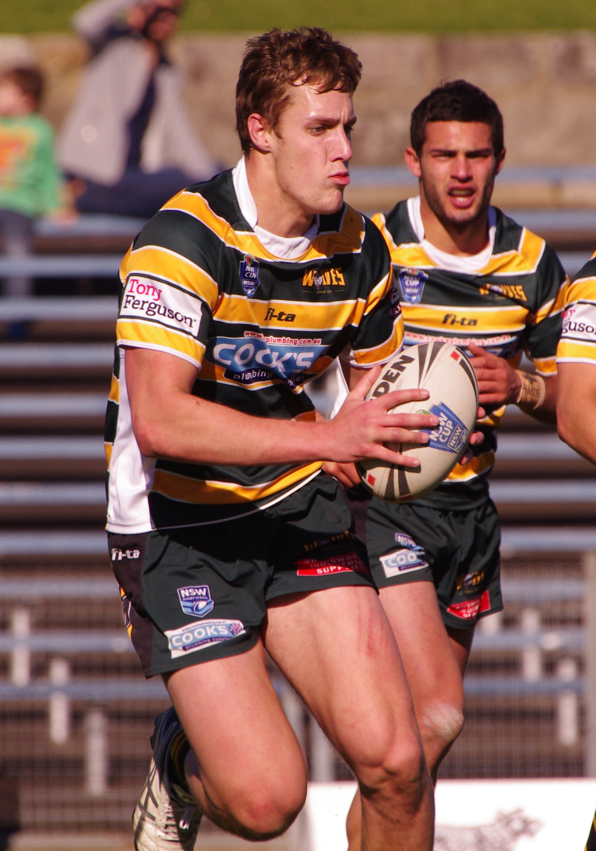 ISAAH YEO